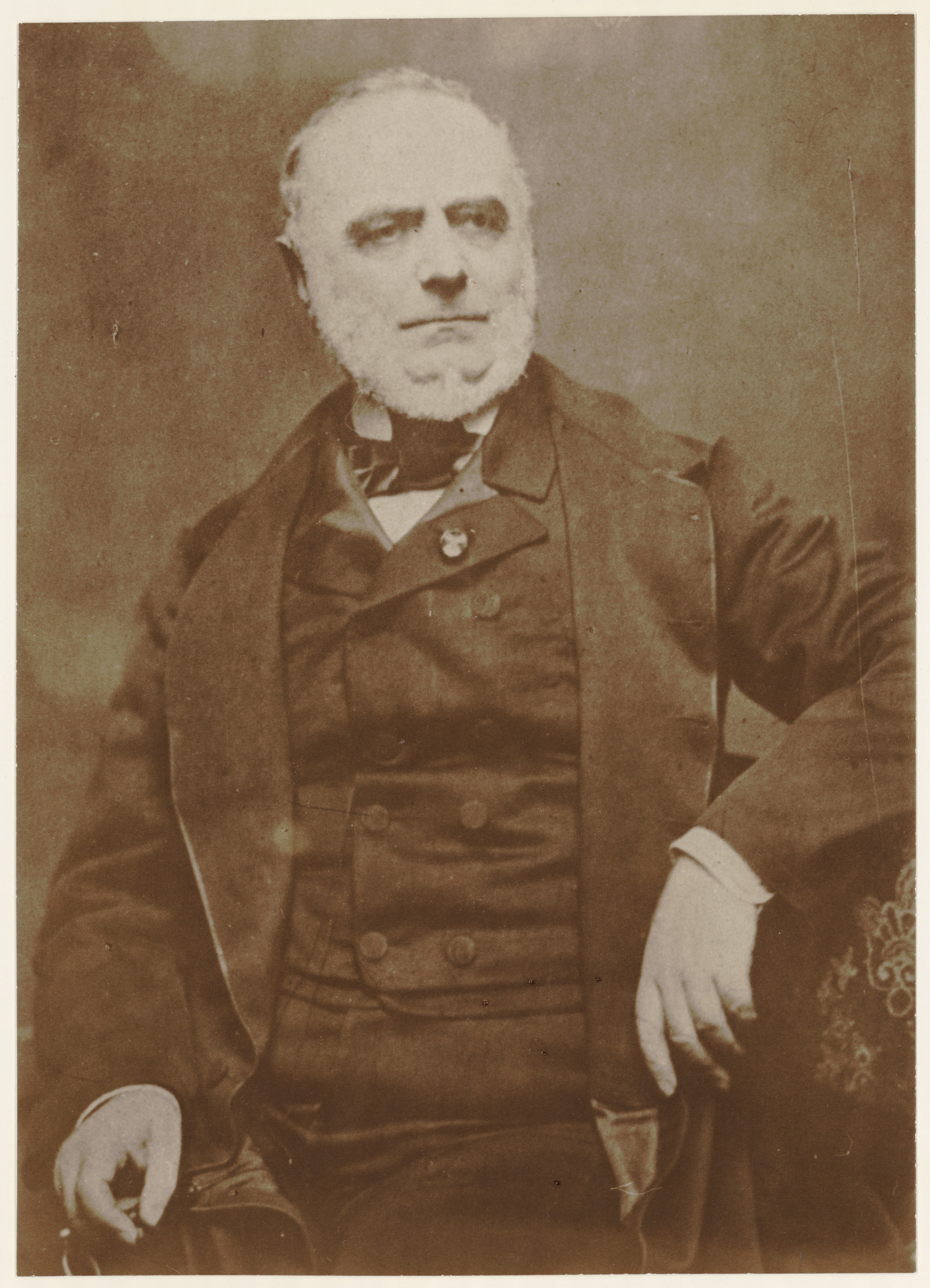 Portrait du préfet Claude-Marius Vaïsse (1799-1864).